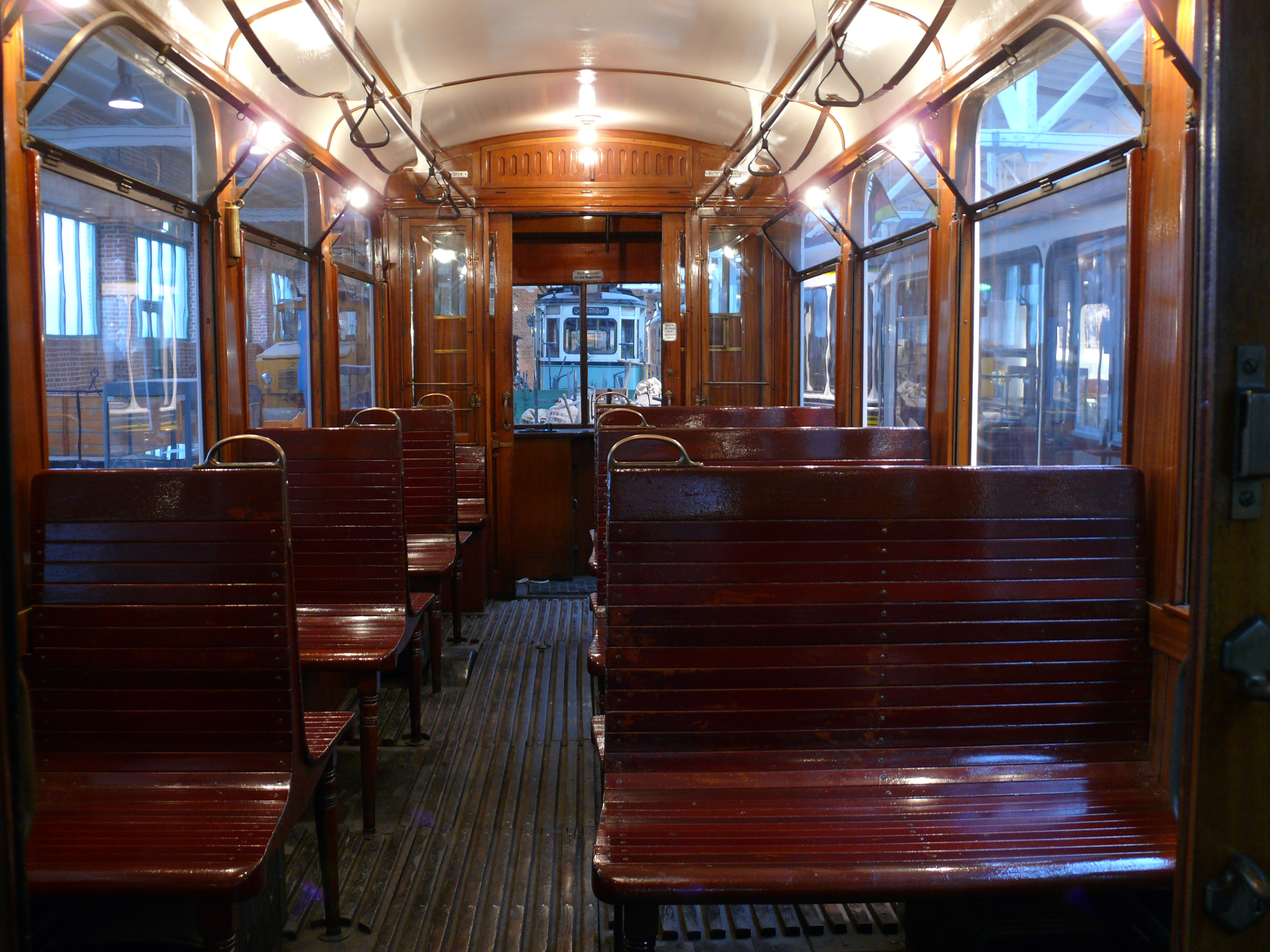 Innenansicht des Triebwagen 15 der SSF (Städtische Straßenbahn Feuerbach), im Stuttgarter Straßenbahnmuseum.